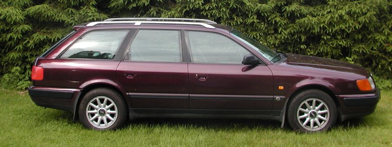 Audi 100 Avant 1992 - Sideview. Dark red, Zyklam Perleff. (L-0Z3-TP2)